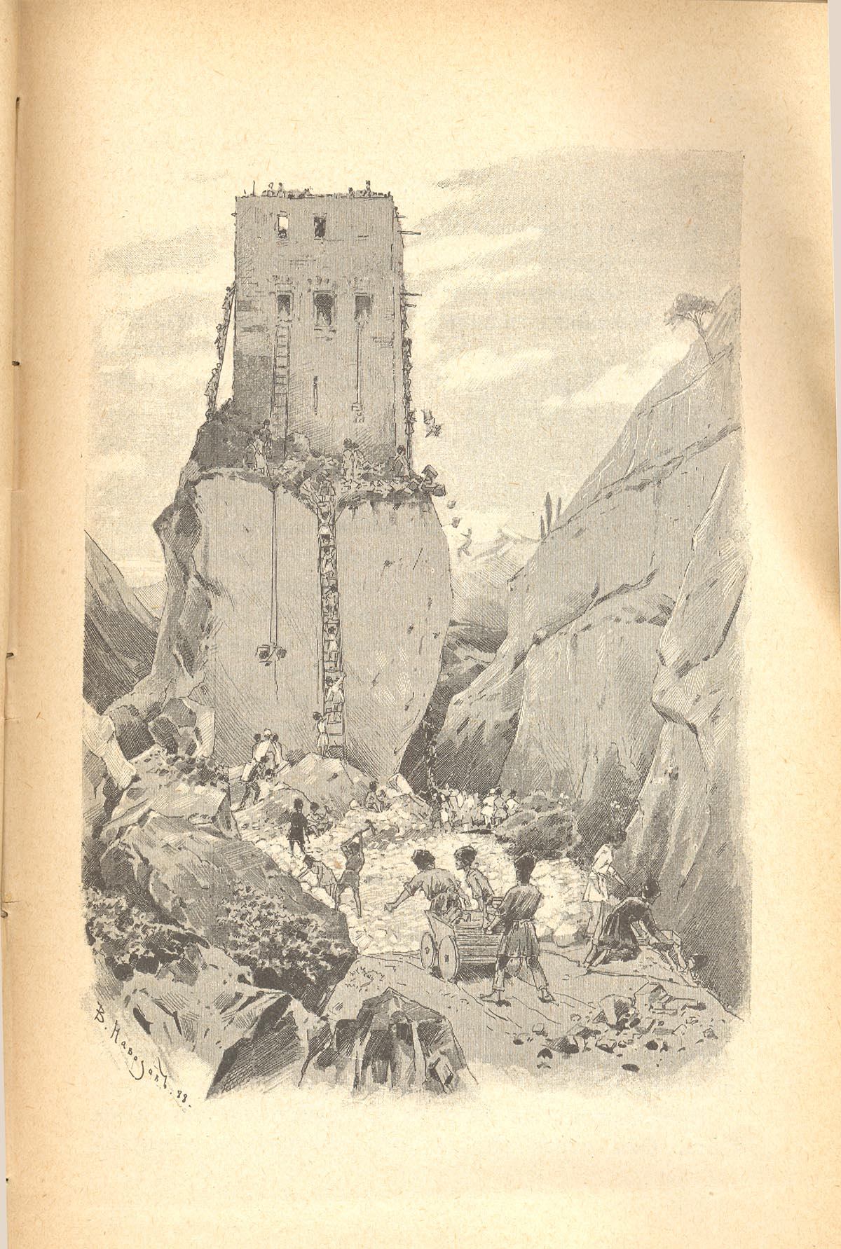 Картины и иллюстрации Навозова Василия Ивановича (1862-1919)